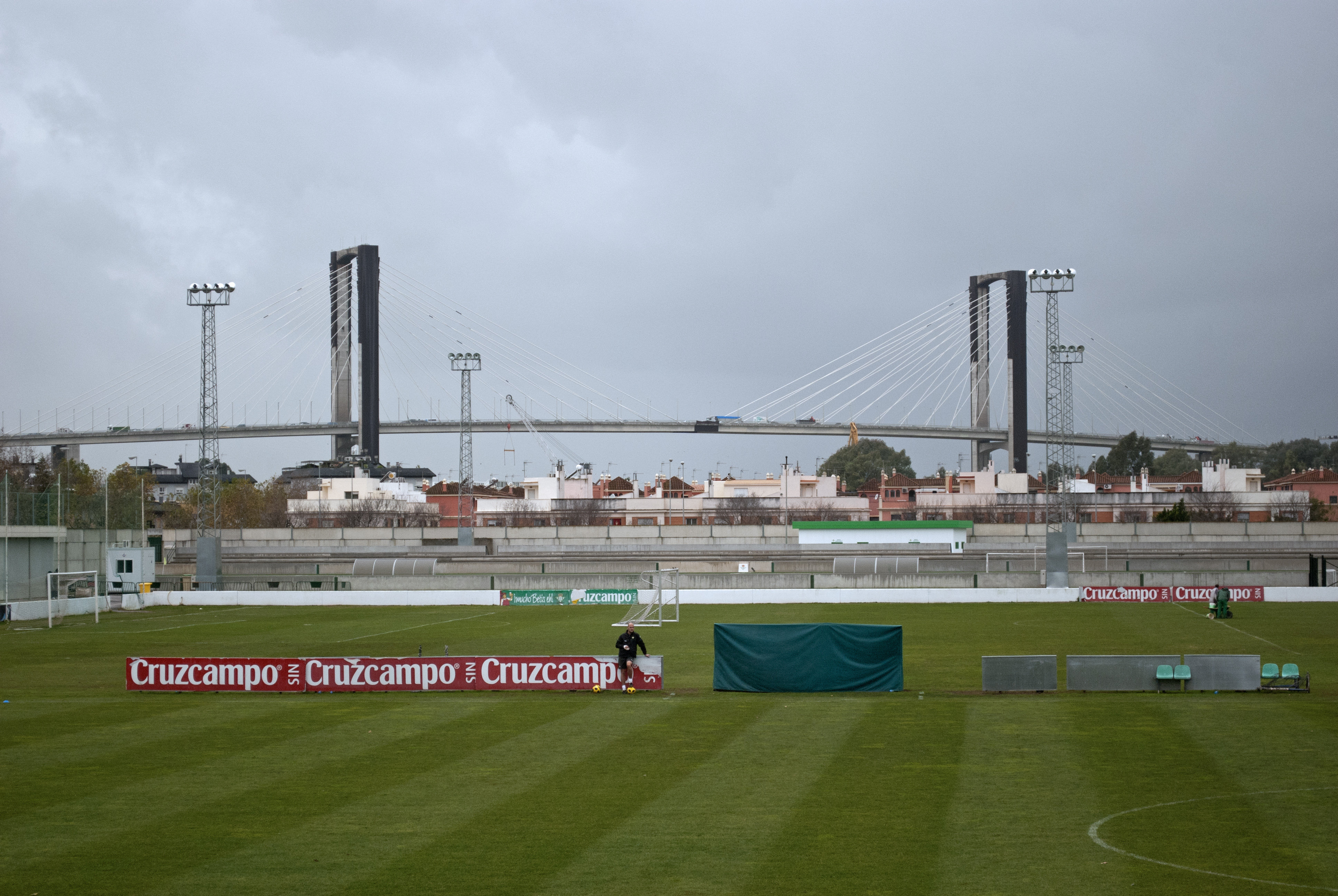 Ciudad deportiva del Betis, durante un entrenamiento del equipo. Se puede ver al segundo entrenador Roberto Ríos. Al fondo el puente del V Centenario. Sevilla